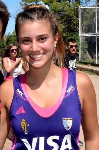 Mercedes Taboada en el seleccionado Sub-21 de Argentina